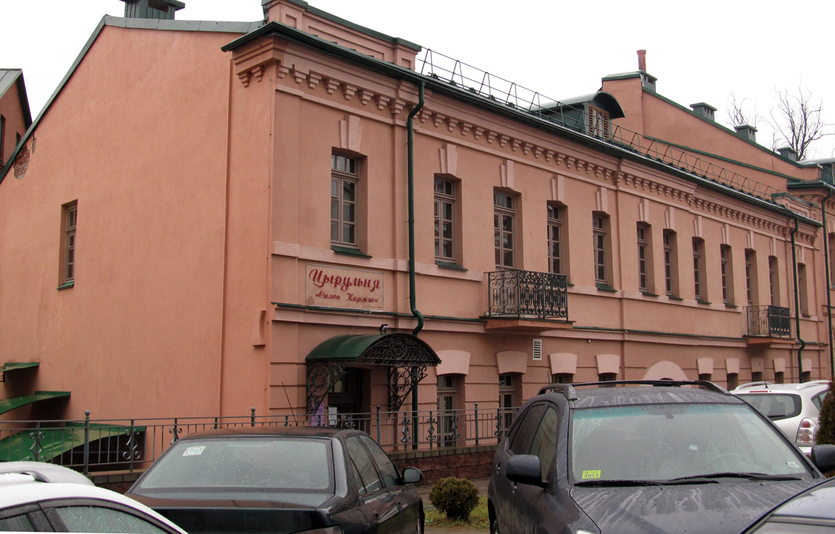 Мінск. Вуліца Віцебская, 11